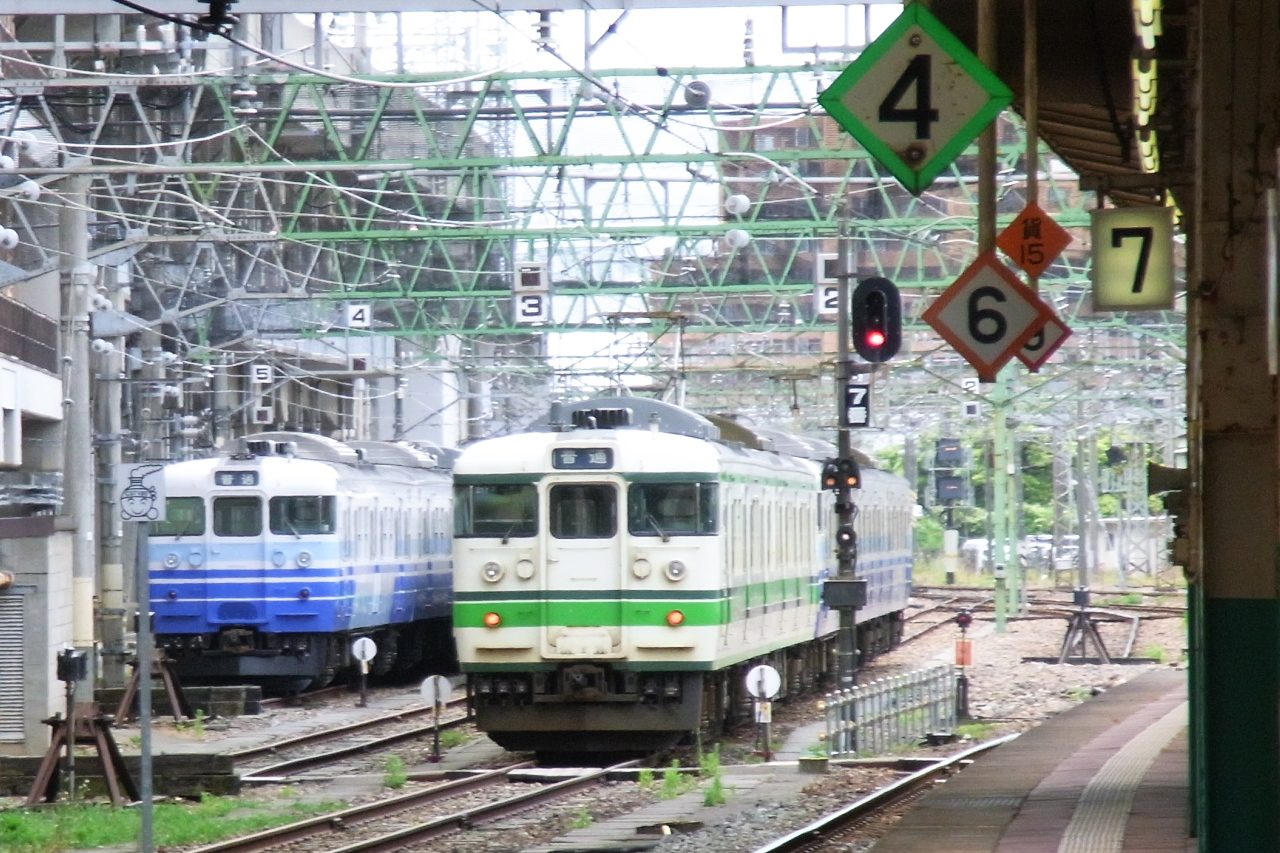 新潟駅の側線にいた普通列車。